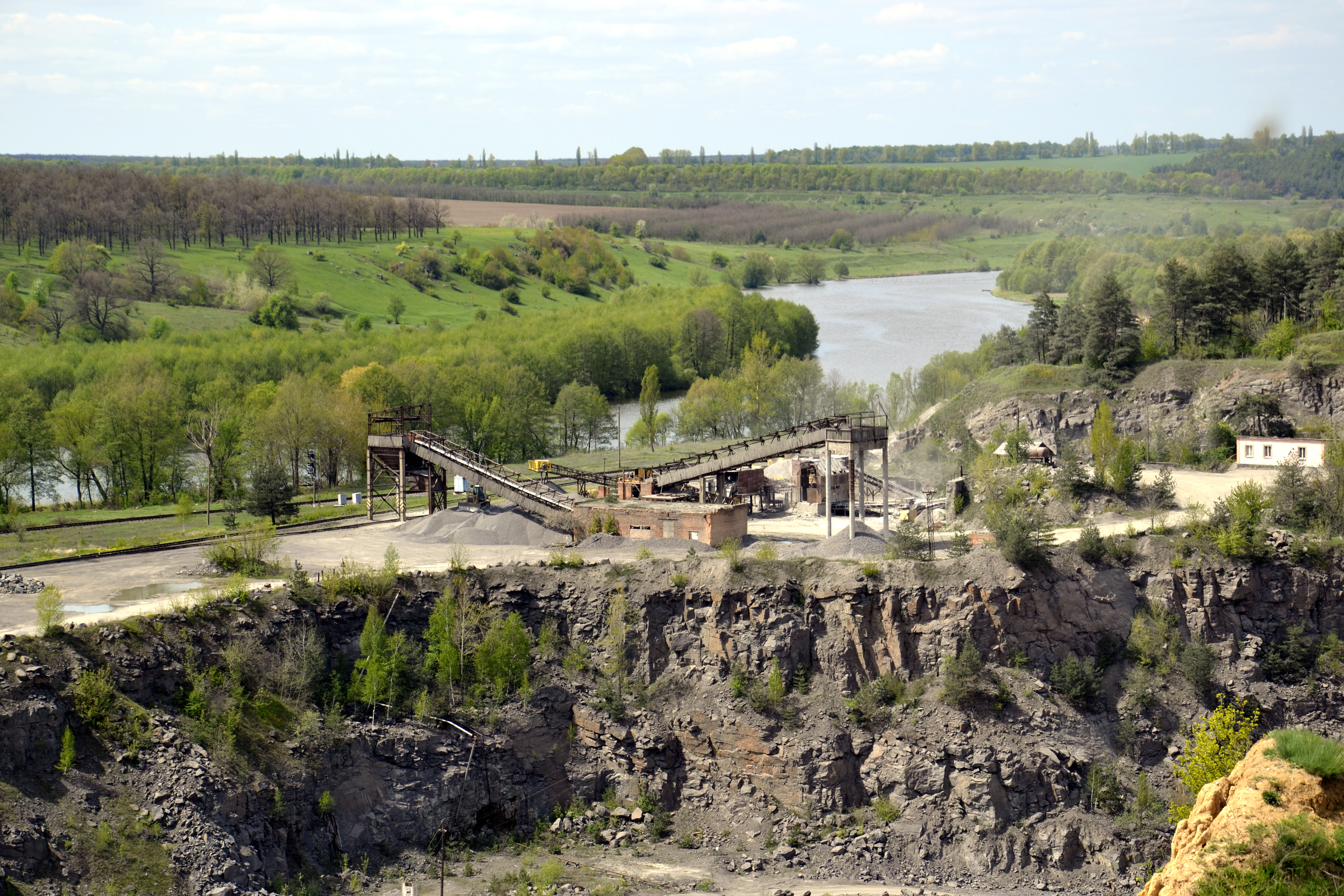 Райгородський карєр